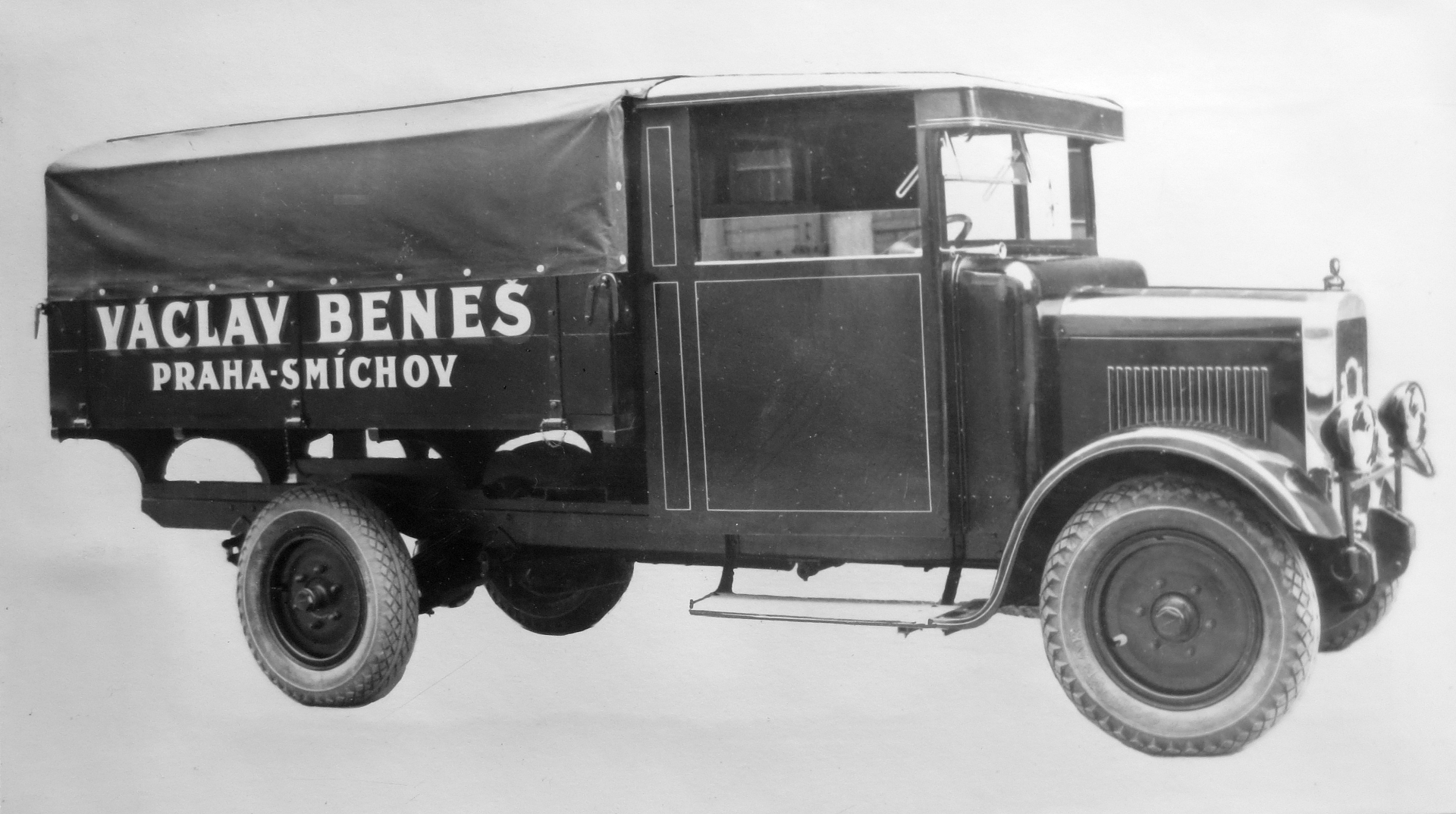 Walter Comercial valník Beneš (1930)